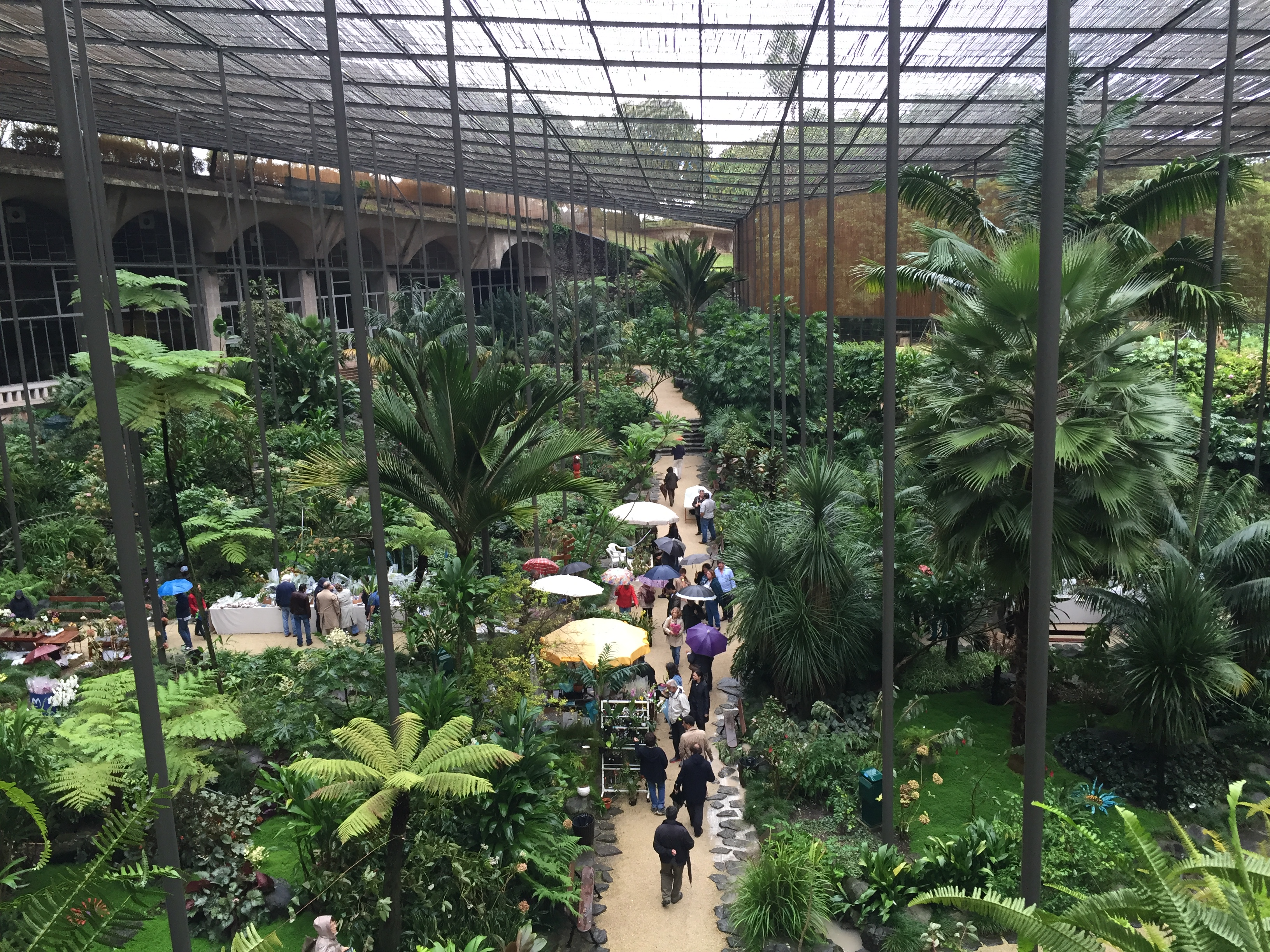 Estufa Fría